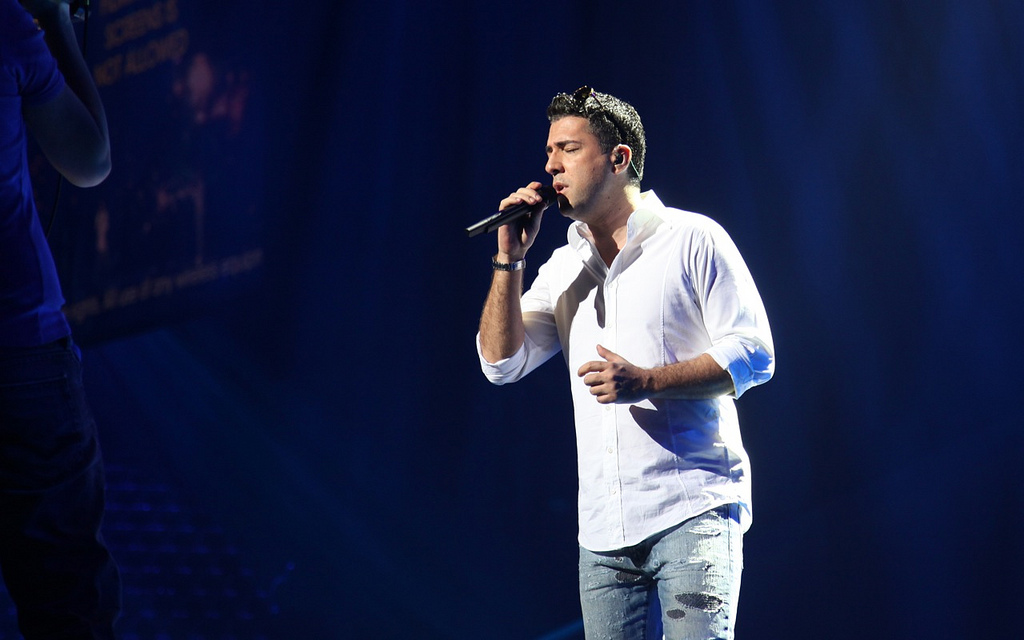 Zeljko Joksimovic